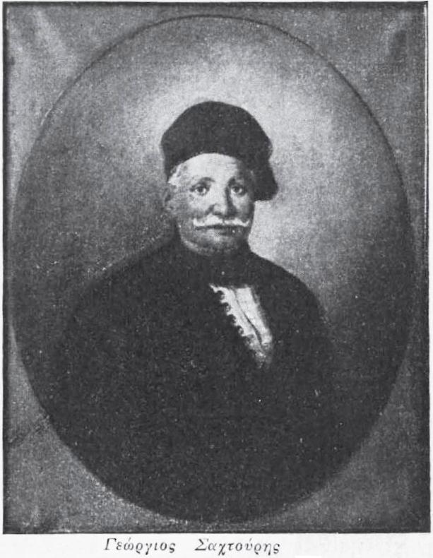 griechischer Freiheitskämpfer, 1821